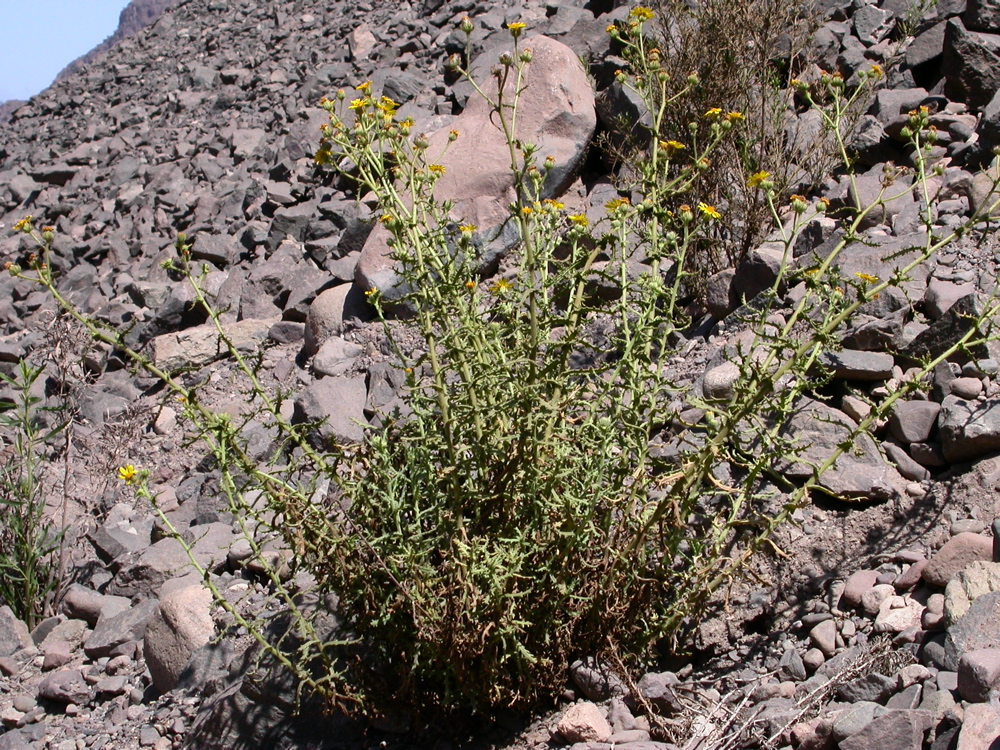 Senecio murinus